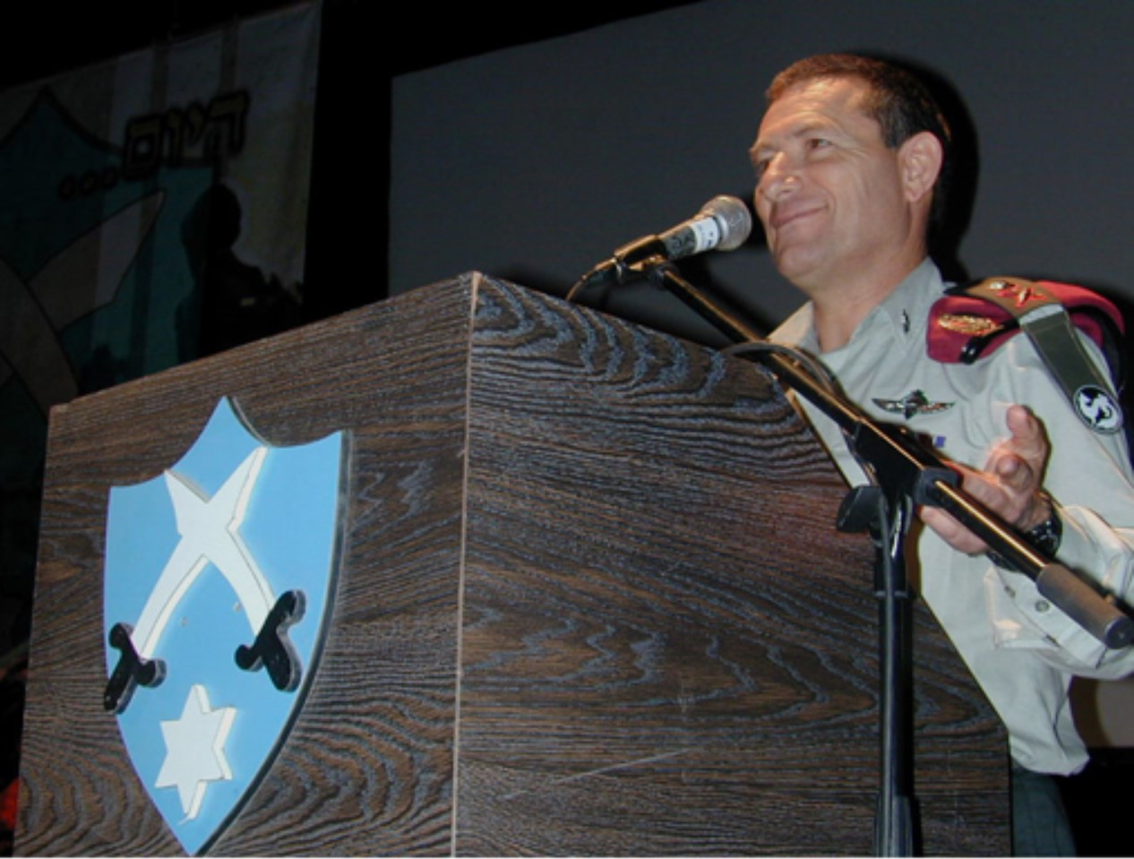 גדוד 299 (גדוד חרב הדרוזי) נפרד מפיקוד הדרום ועולה צפונה. בתמונה מפקד פיקוד הדרום, האלוף דורון אלמוג במהלך טקס הפרידה בערב היחידה שנערך בנוכחתו ובנוכחות מפקדים אחרים מהפיקוד.